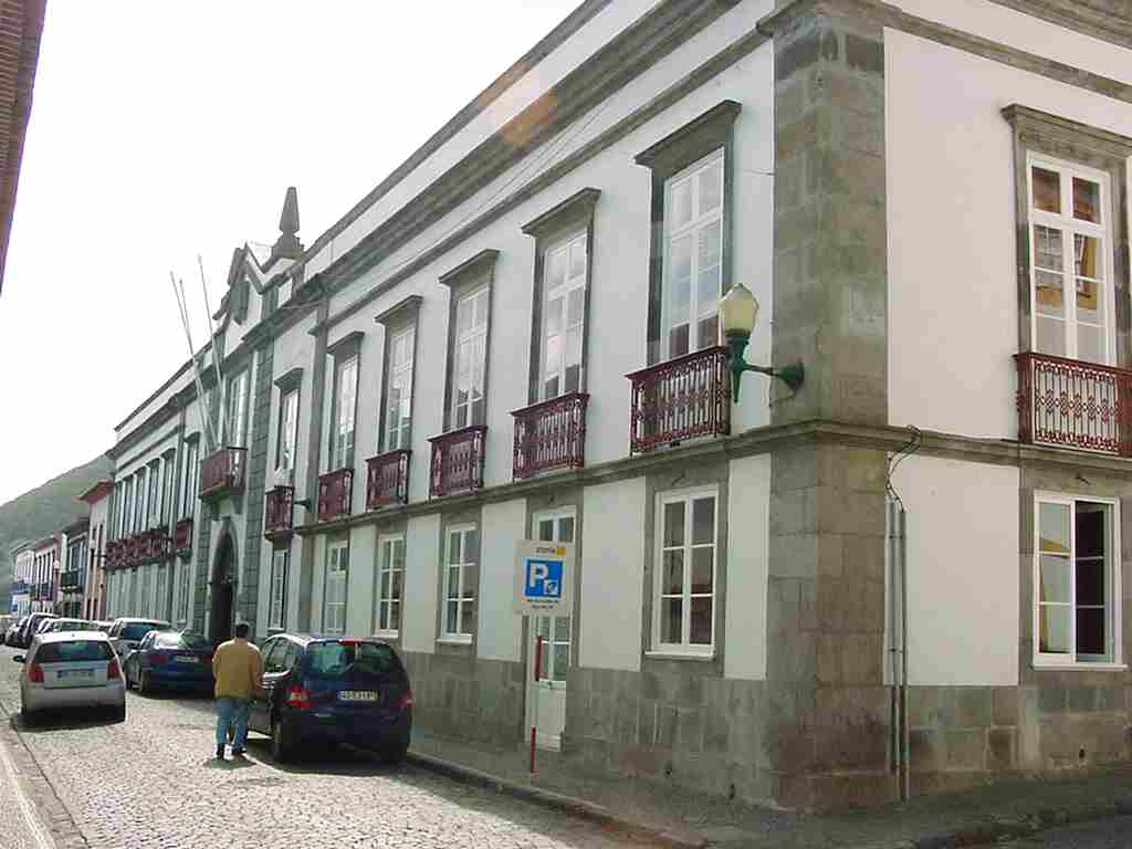 Antigo Paço Episcopal, mais tarde Junta Geral de Angra do Heroísmo, acesso ao 2º andar.